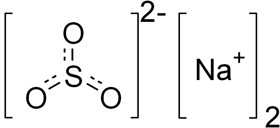 chemical structure of sodium sulfite (sulphite)